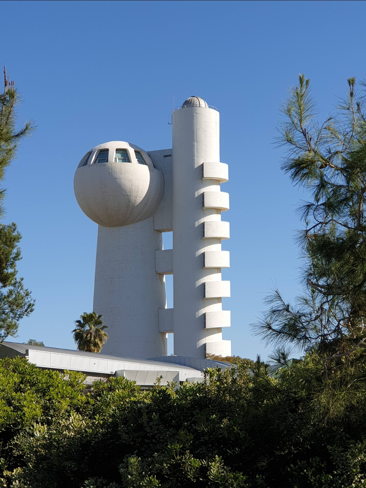 בעבר מאית חלקיקים